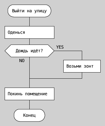 ДРАКОН-схема выхода из дома.